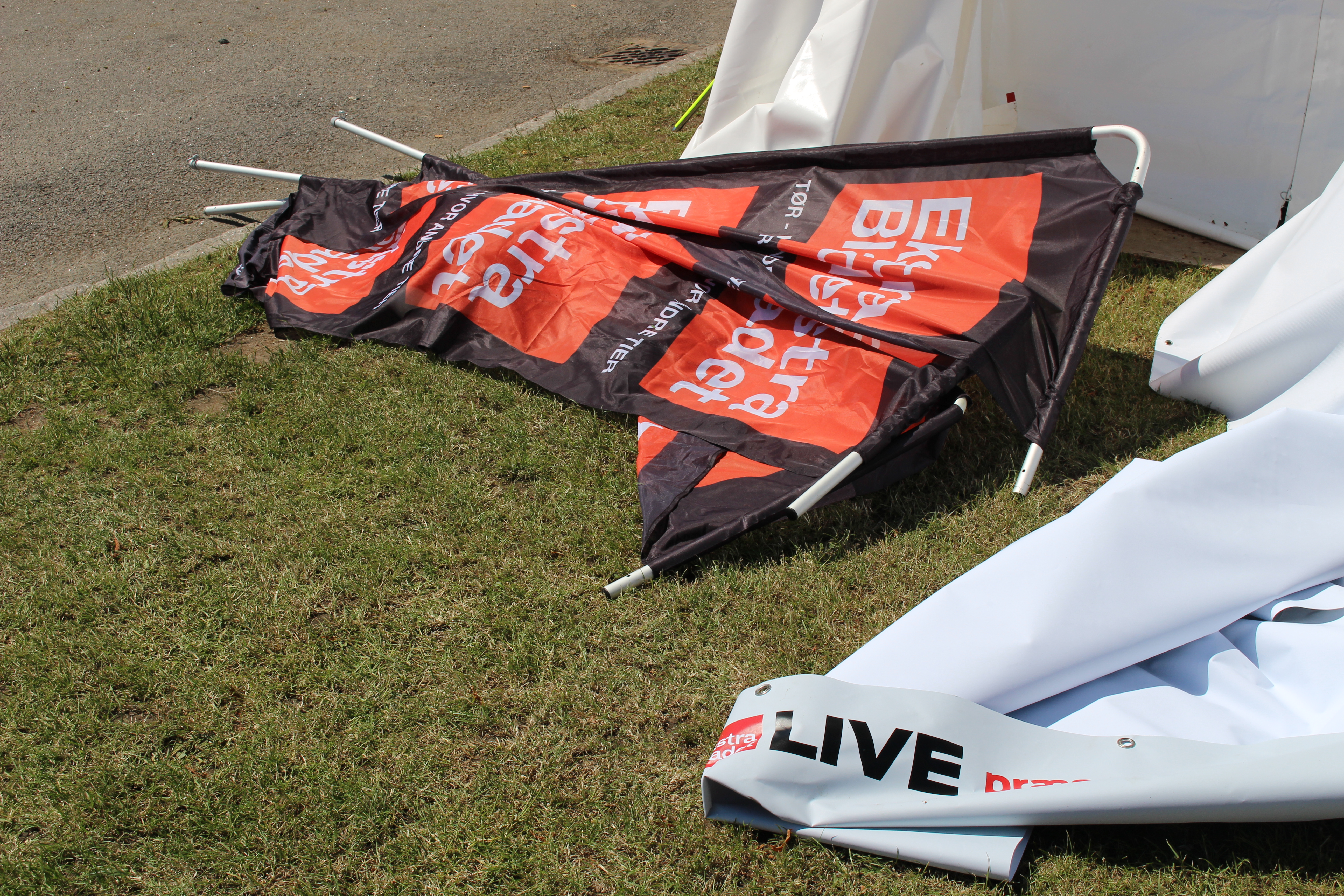 Ekstra Bladets banner og pressening sidste dag på Folkemødet 2016